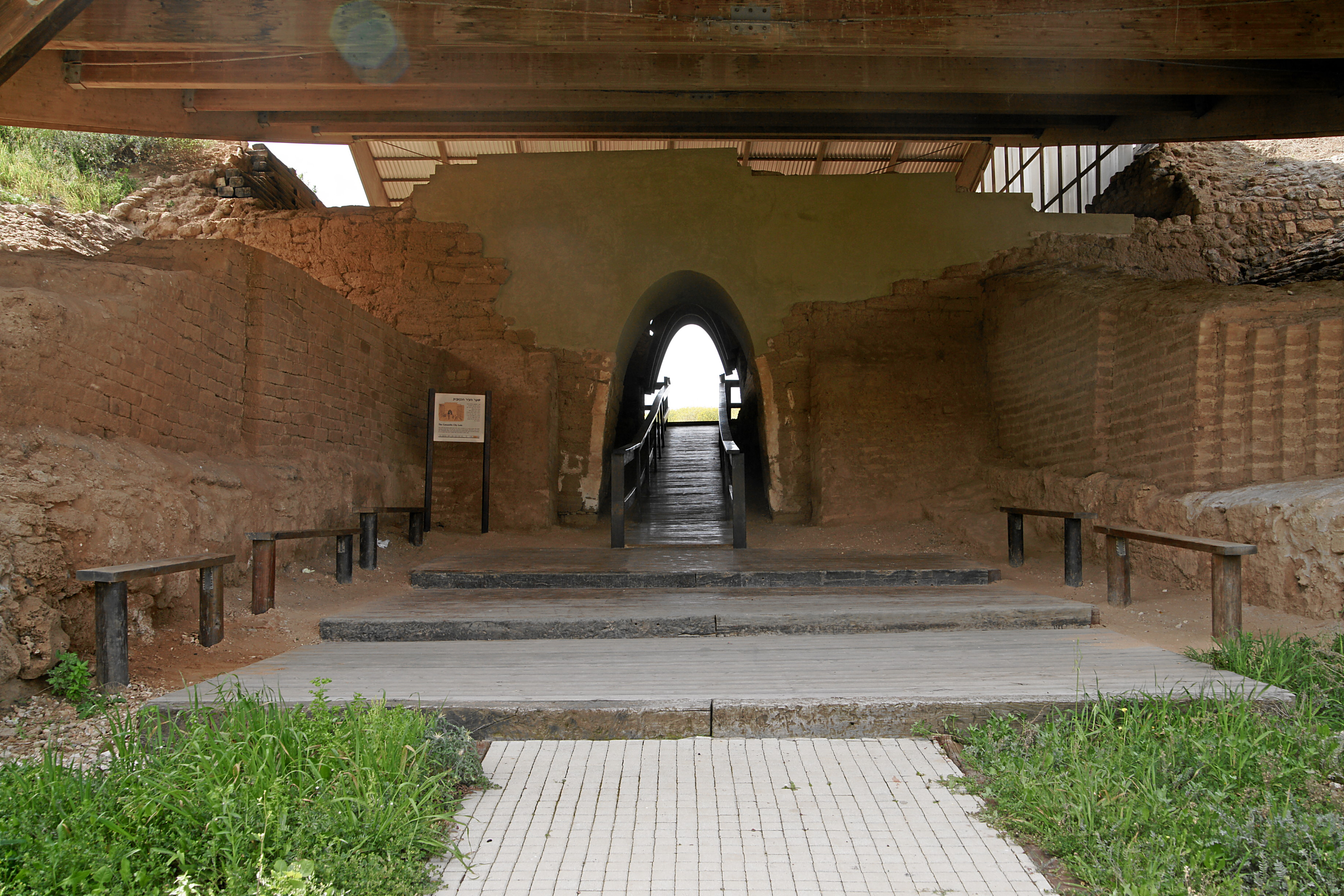 Ashkelon: Kanaanitisches Stadttor